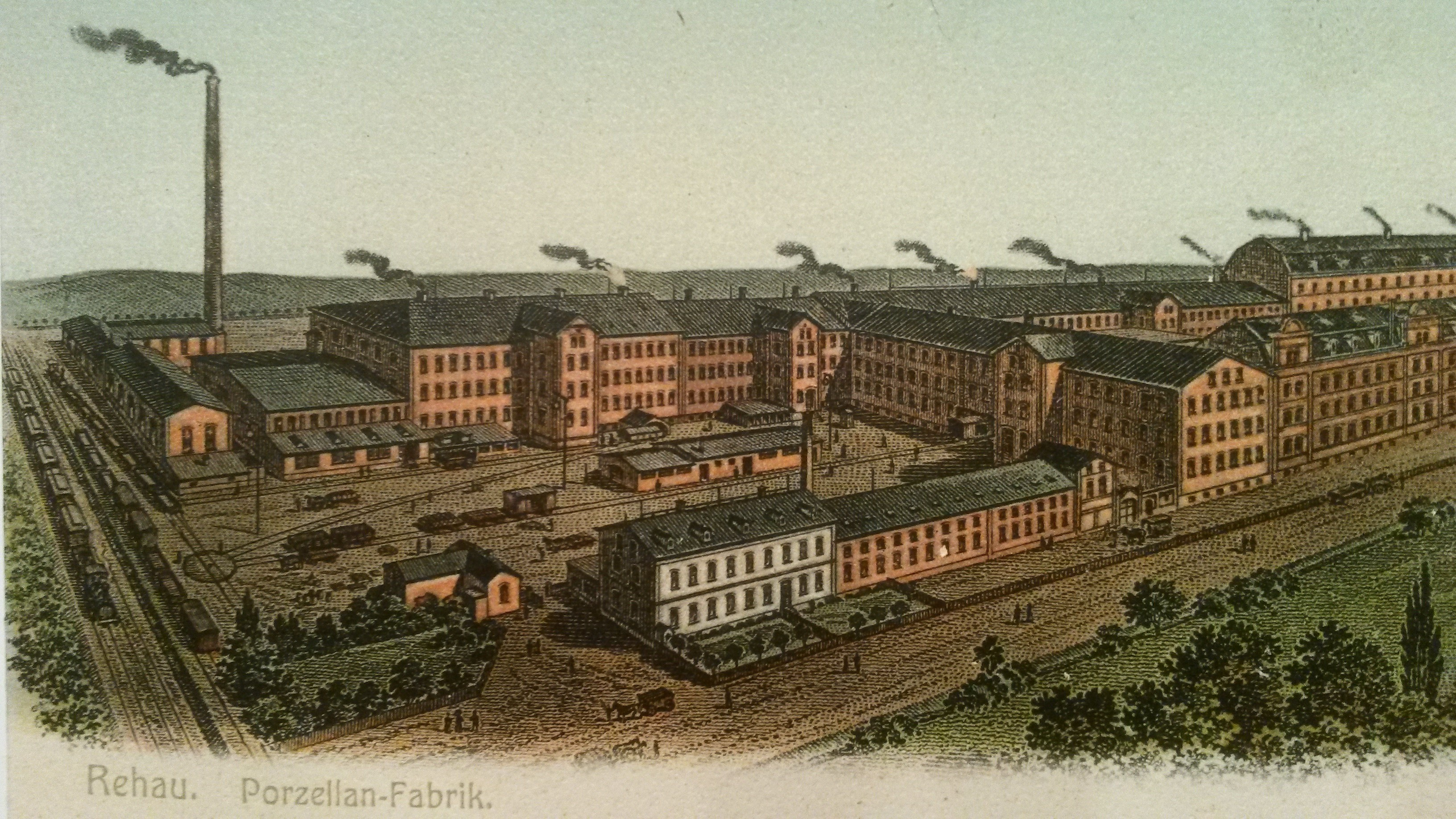 Ansichtskarte der Porzellanfabrik Zeh, Scherzer & Co. in Rehau um 1900